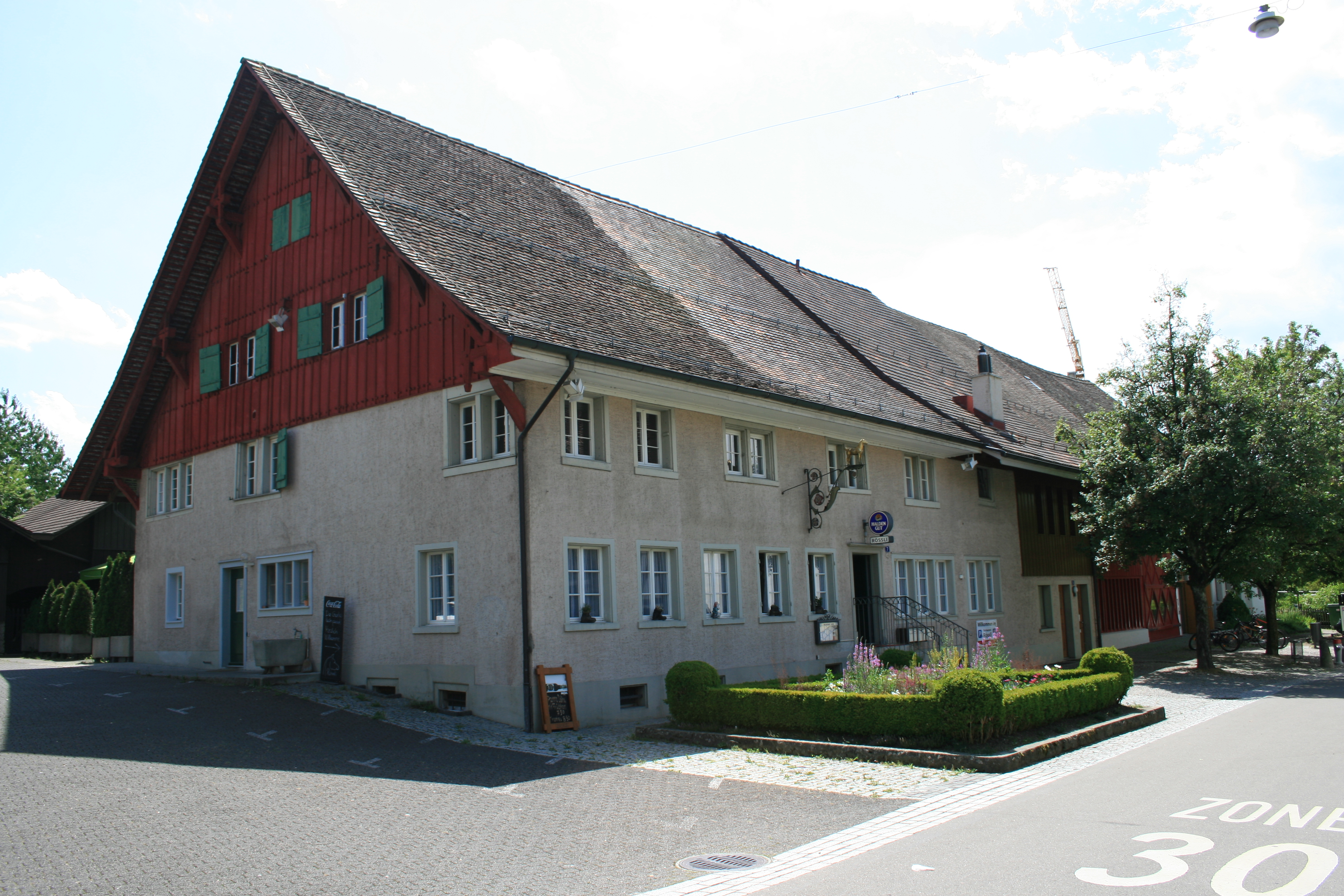 Gasthof Rössli, Rössligasse 7-11 (Kommunales Schutzobjekt der Stadt Winterthur)